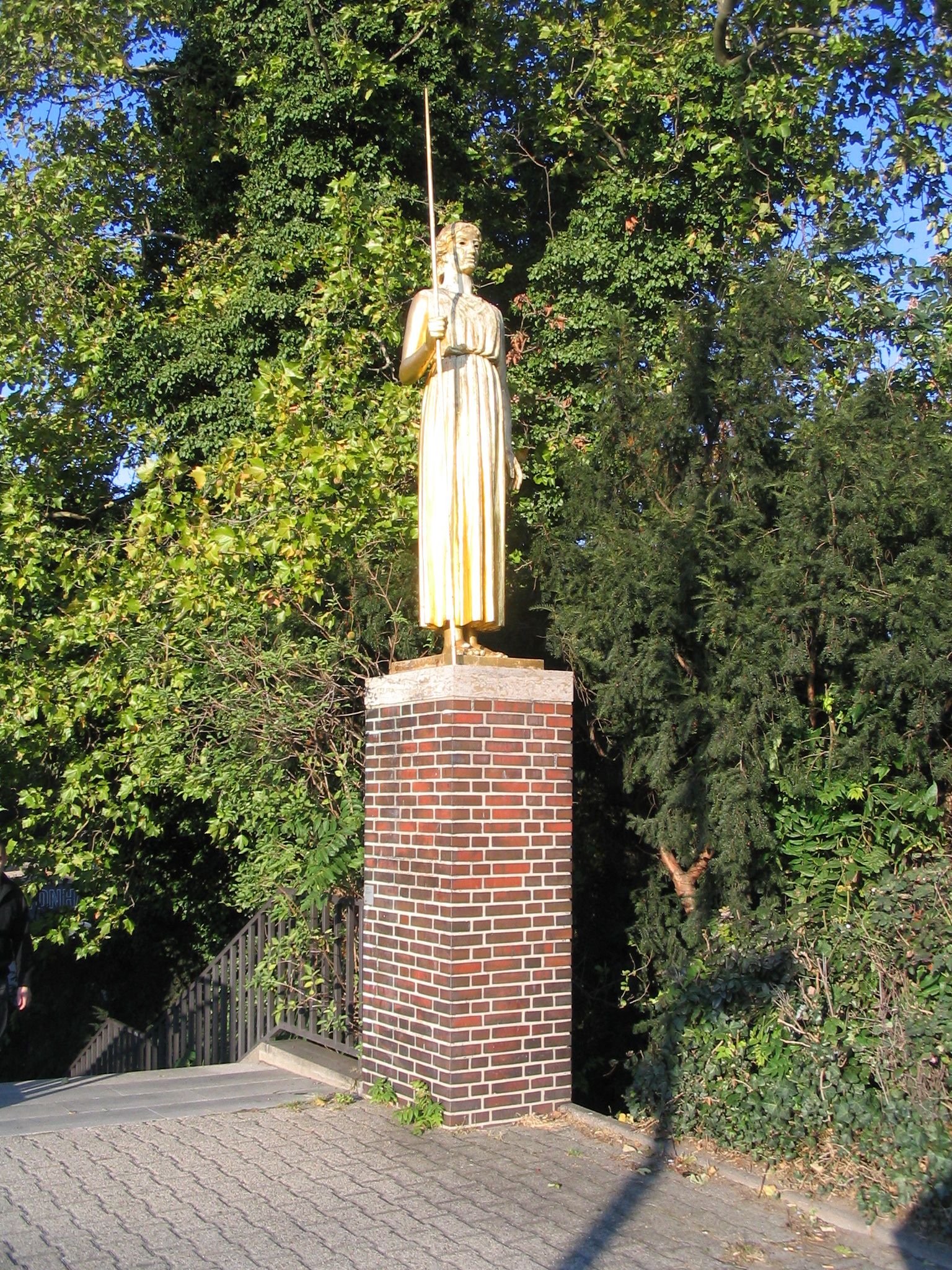 Bildhauer Johannes Knubel: Pallas Athene. Düsseldorf. Standbild an der Südseite des Ehrenhofs an der (östlichen) Südseite der Tonhalle, an der Hofgartenrampe, der Auffahrt zur Oberkasseler Brücke. Sie schaut auf die gegenüber der Hofgartenrampe befindliche Kunstakademie Düsseldorf.